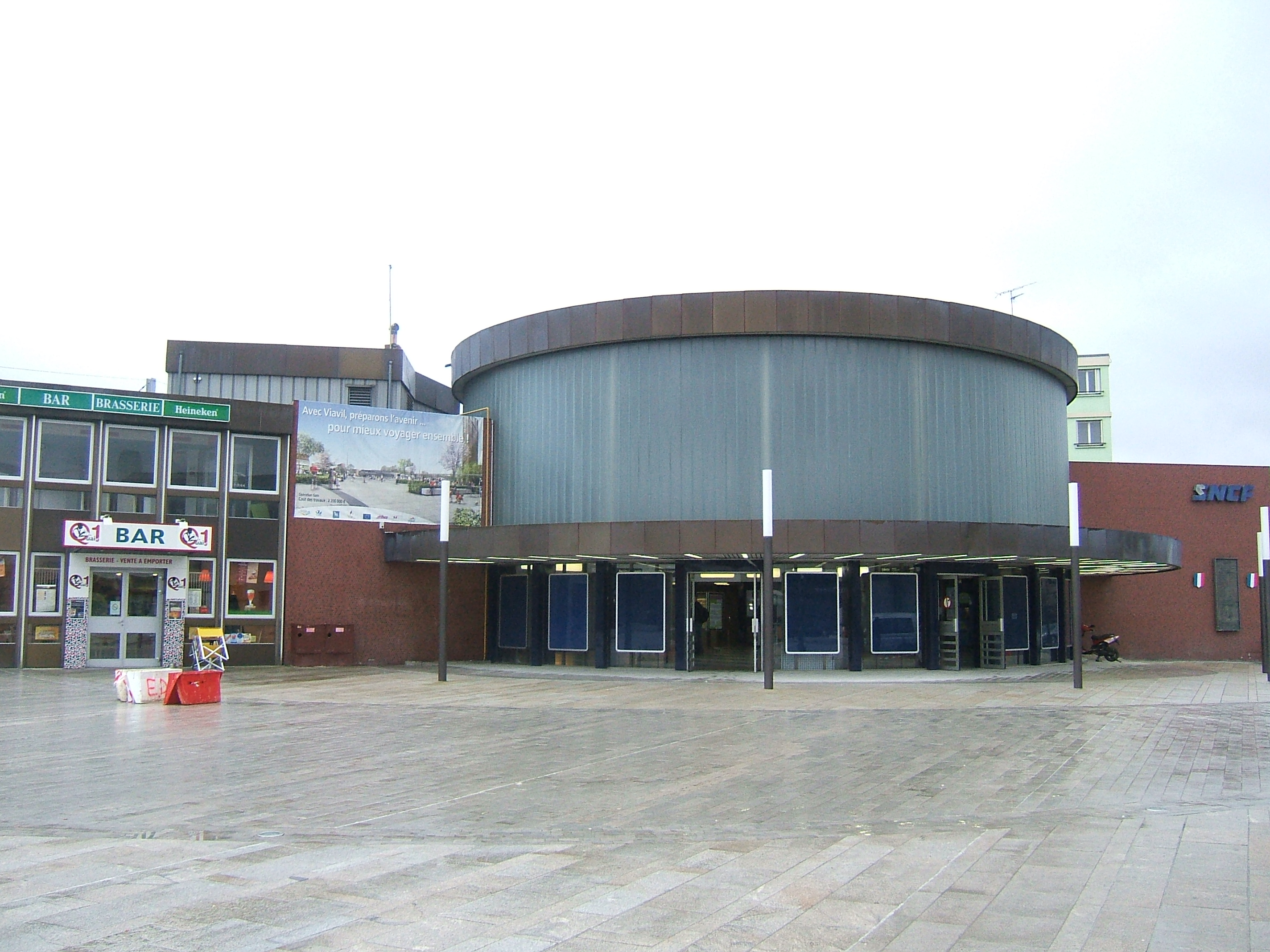 Gare de Maubeuge, Nord, France